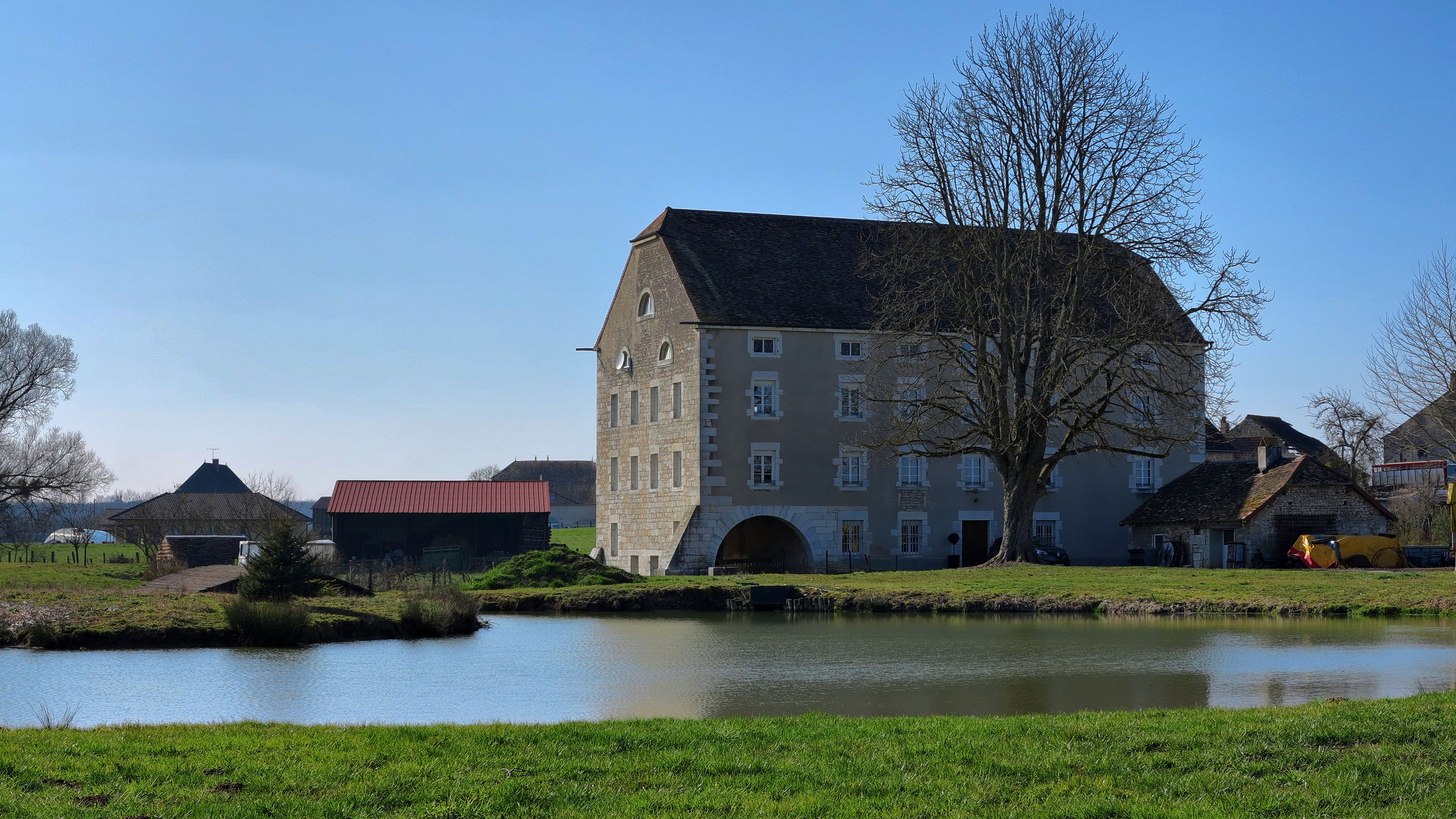 Le moulin sur la Morthe